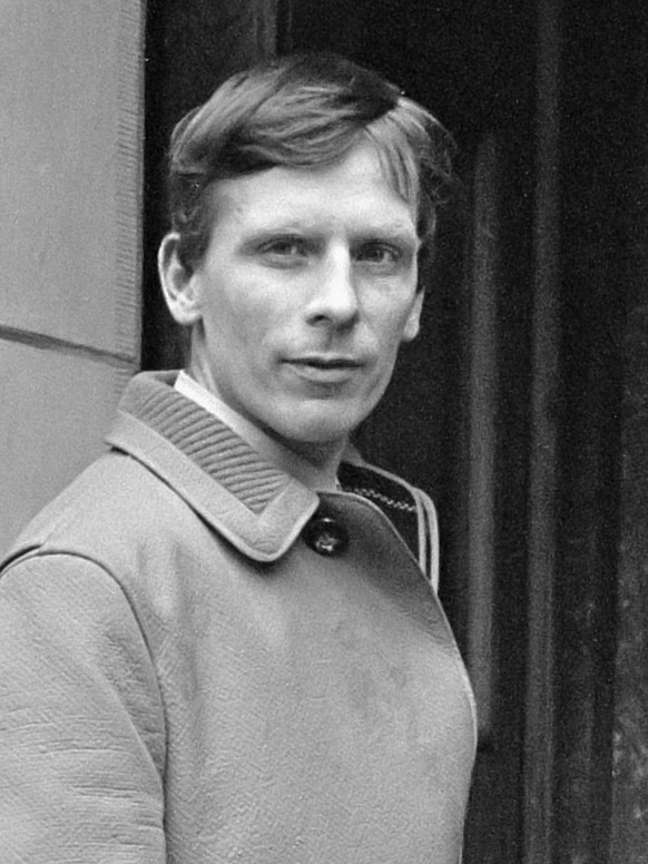 Luud Schimmelpennink nieuwe vertegenwooriger van de Provo's in de Amsterdamse Gemeenteraad, hier aankomst bij het stadhuis 22 maart 1967